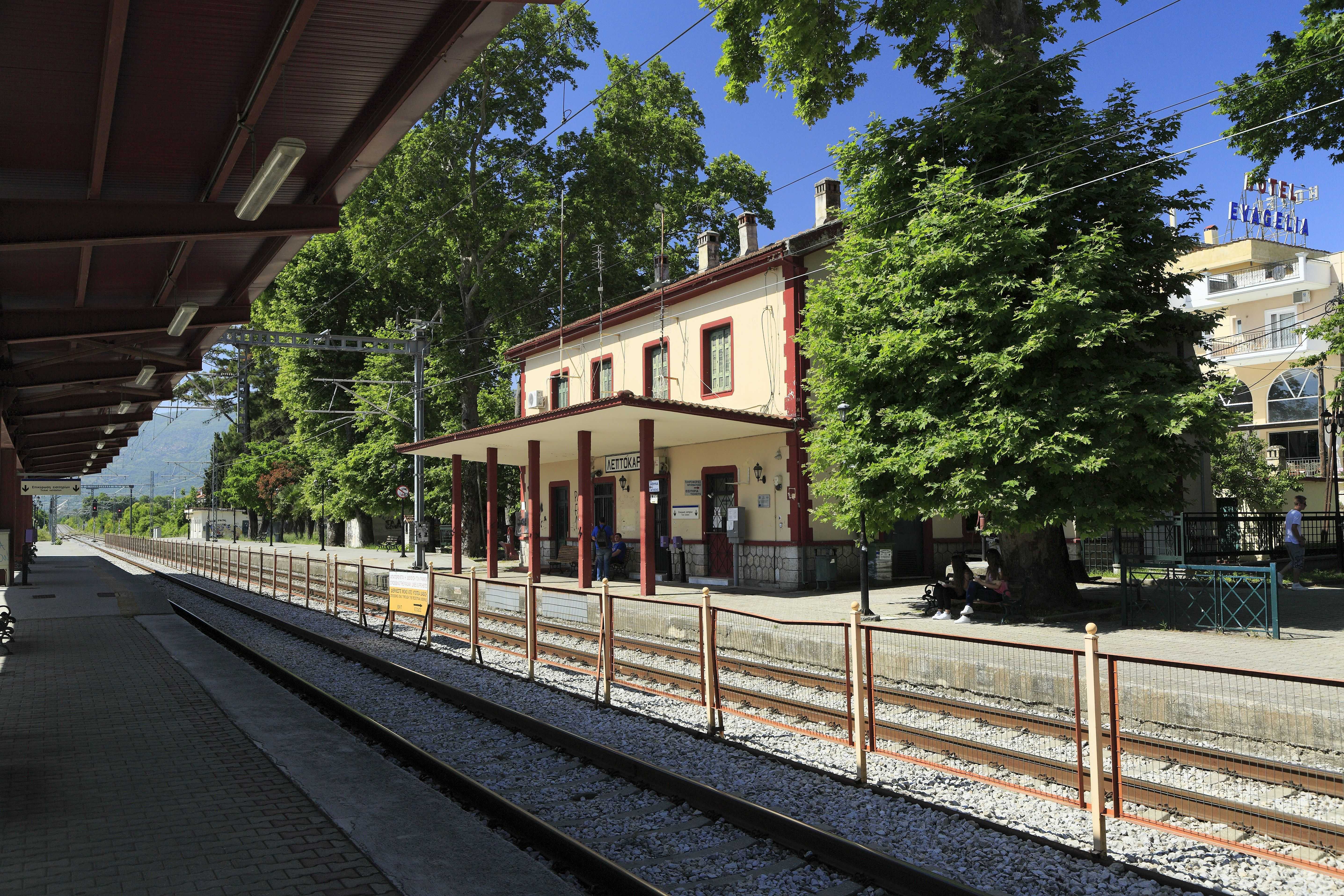 Der Zaun zwischen den Hauptgleisen soll die landestypische Abkürzungsvariante behindern, doch seine Wirksamkeit ist begrenzt. Die rechte Tür des Dienstgebäudes zum Bahnsteig bildet den Fahrkartenschalter.